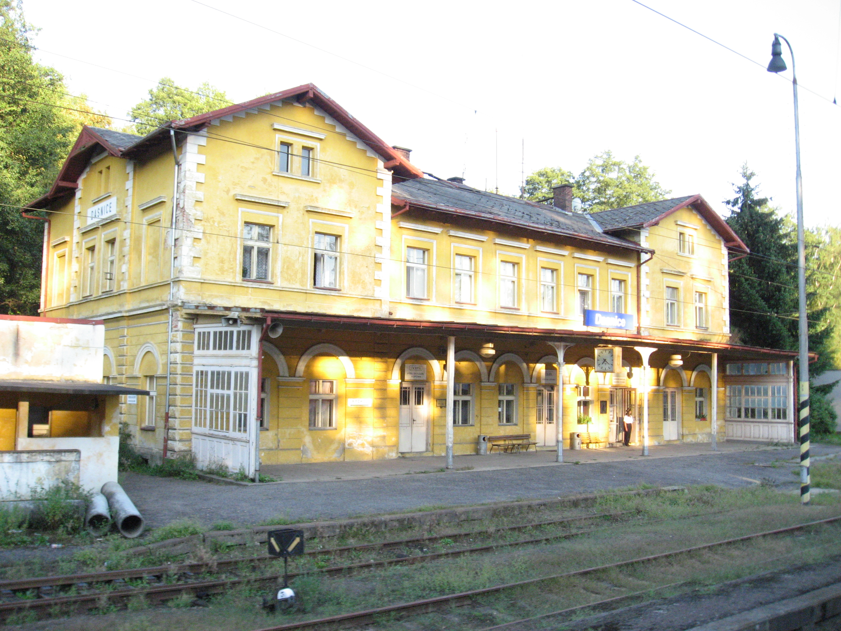 Dasnice, železniční stanice